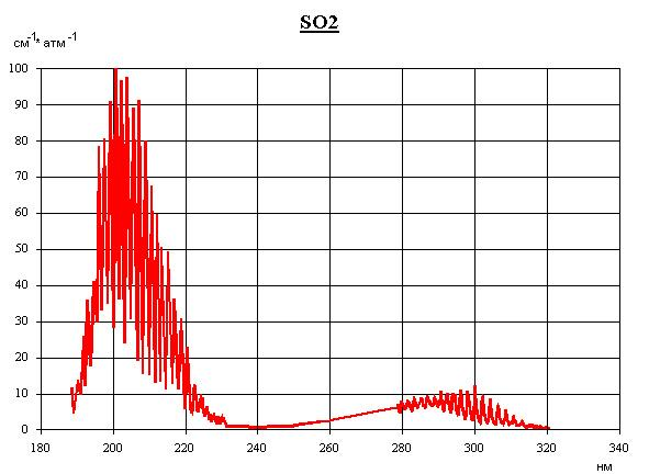 Спектр поглощения SO2 в ультрафиолетовом диапазоне